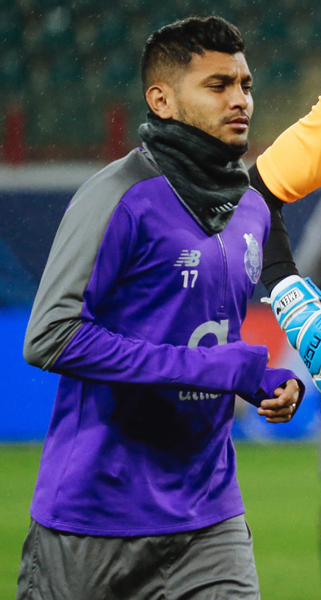 Икер Касильяс вместе с «Порту» готовится к матчу с «Локомотивом»